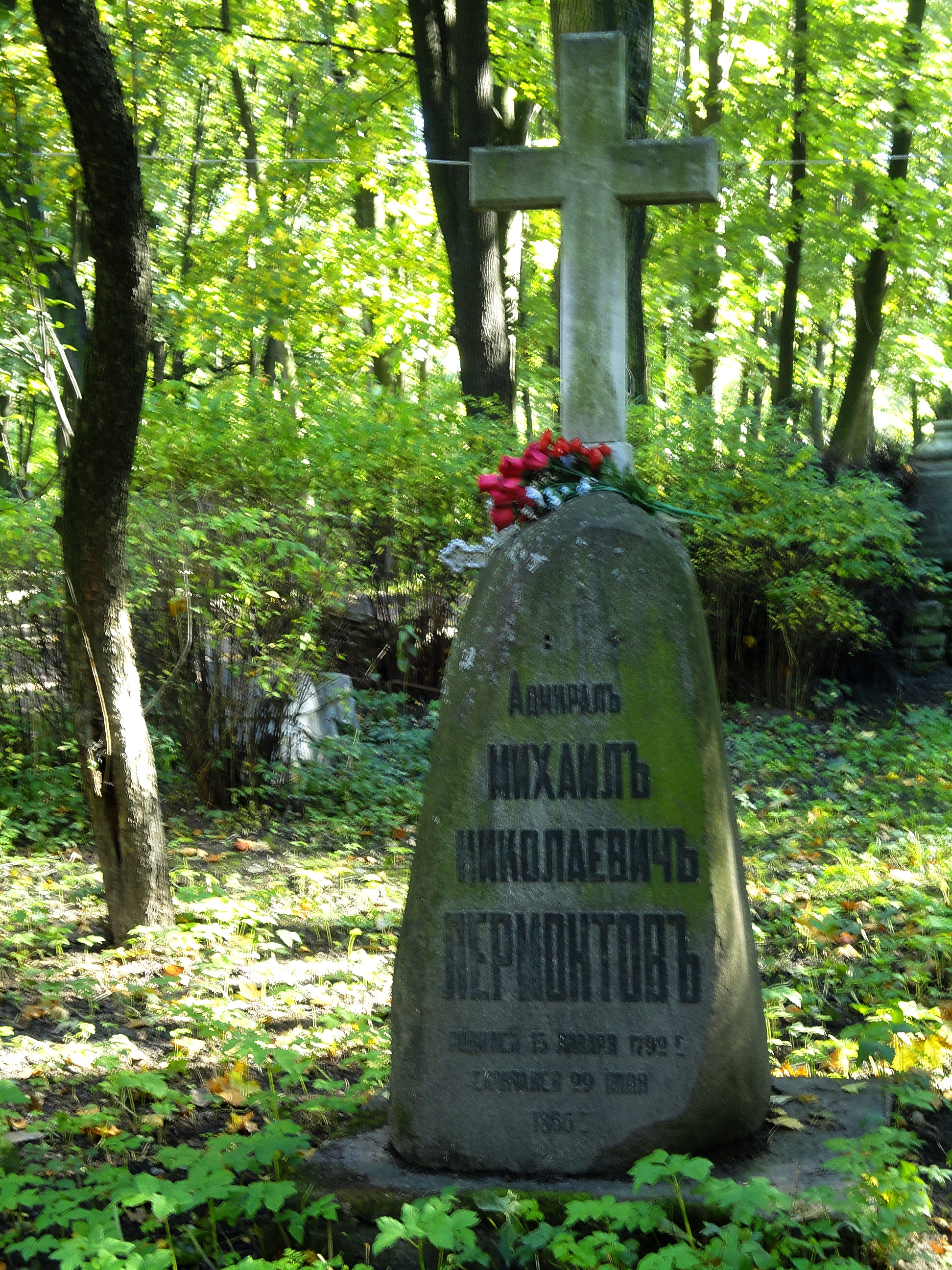 Могила адмирала Михаила Николаевича Лермонтова (1792—1856)